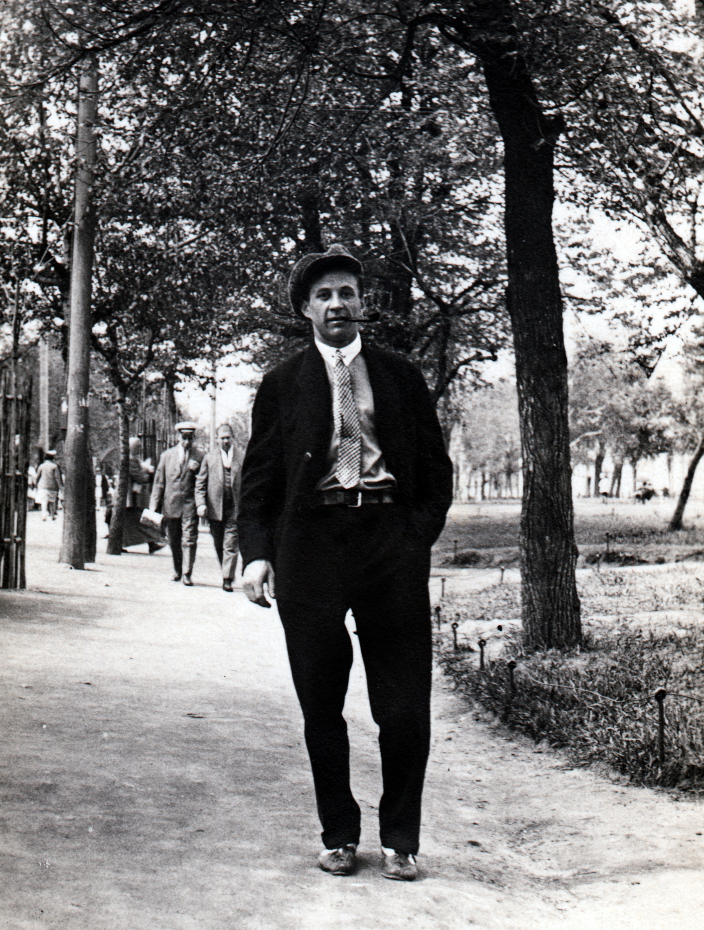 C. И. Маркин на Чистых прудах